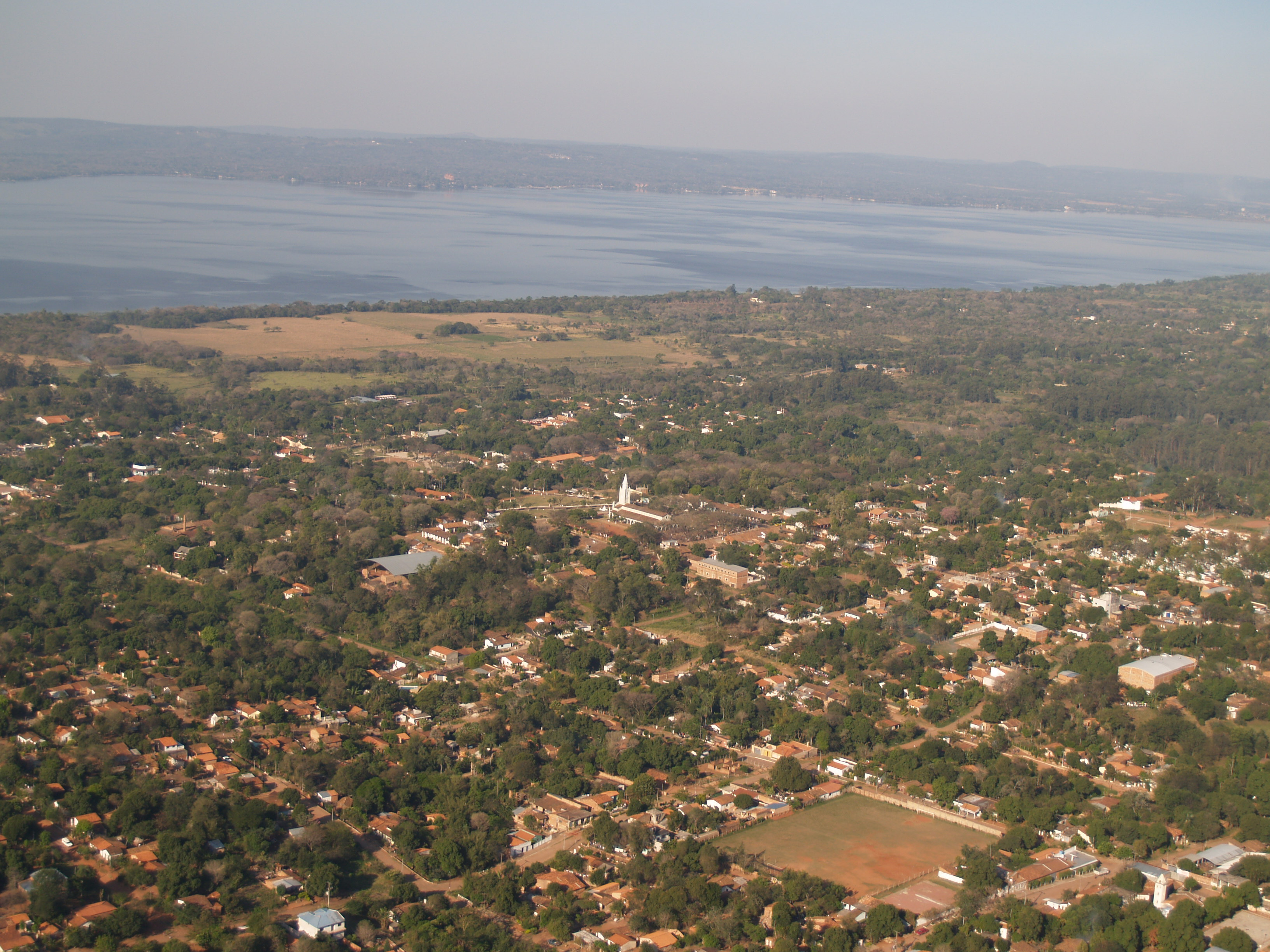 Areguá. Vista aérea